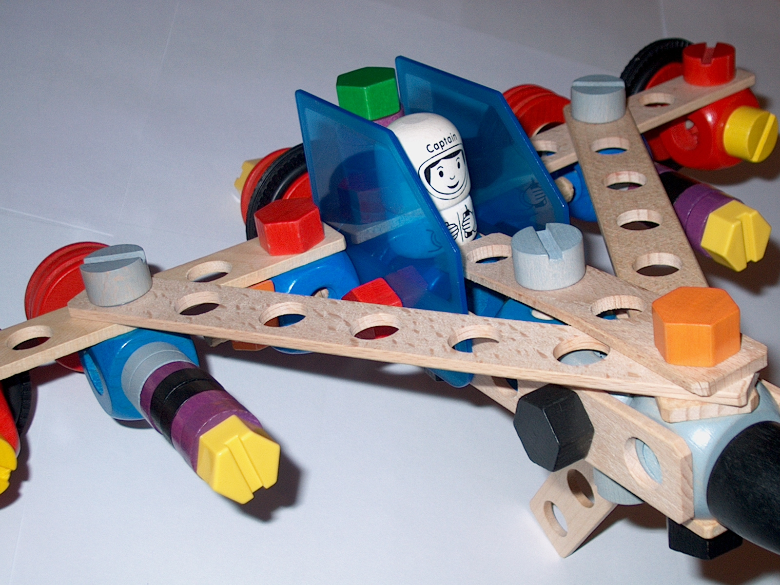 Raumschiff, konstruiert mit Baufix (Konstruktions-Spielzeug der Firma Lorenz, Geretsried)